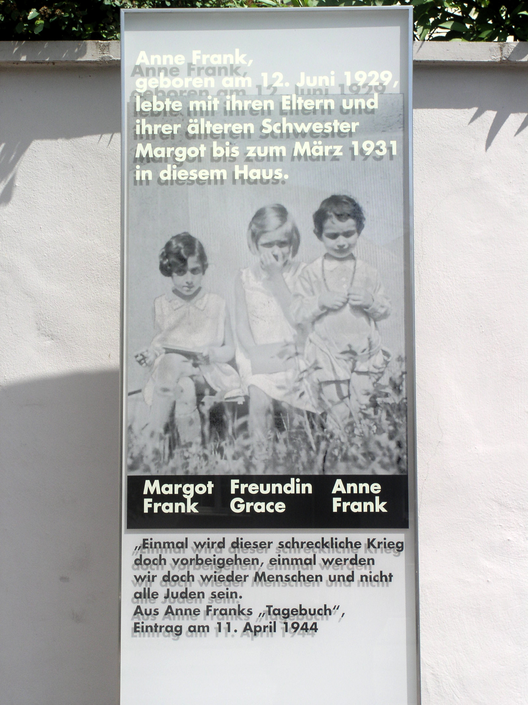 Gedenktafel für Anne Frank an ihrem vormaligen Wohnhaus am Marbachweg 307 in Frankfurt am Main, aufgestellt am 12. Juni 2009 anläßlich des Gedenkens am Tag ihres 80. Geburtstages. Gestaltung der Tafel von Bernd Fischer, Offenbach. Das Zitat ist fehlerhaft.